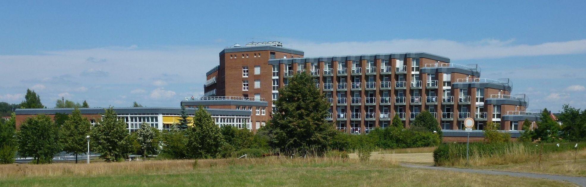 Rehaklinik Brandis